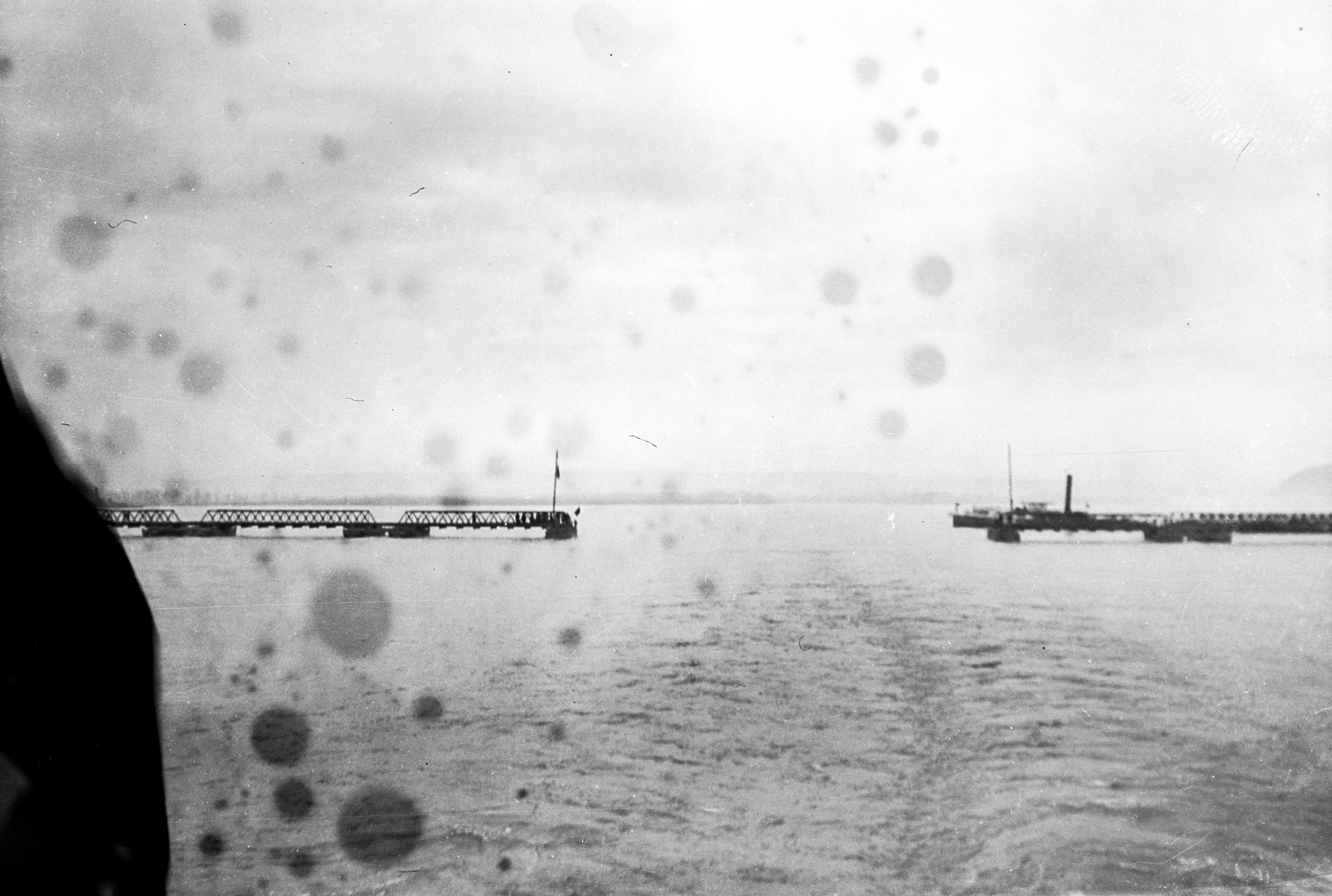 szétnyitott hajóhíd a Dunán. Location: Serbia, Veliko Gradište Tags: First World War Title: szétnyitott hajóhíd a Dunán.